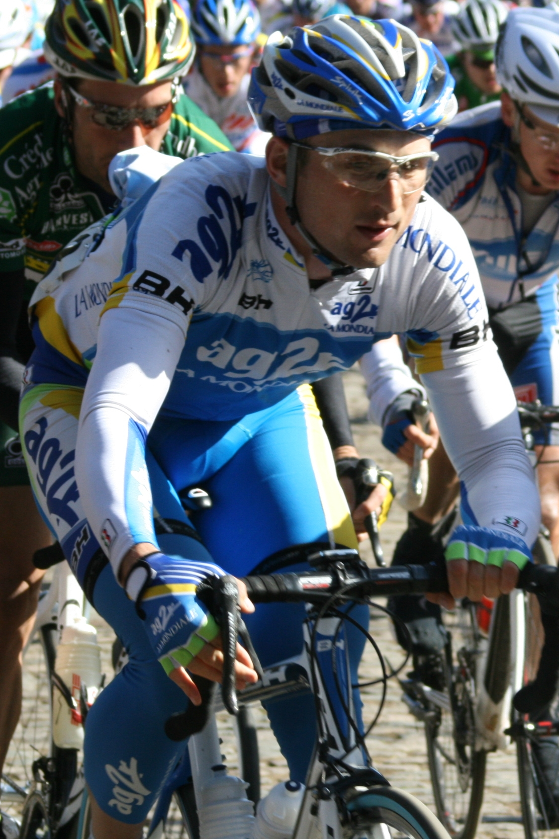 Yuriy Krivtsov au mont Kemmel, lors des Trois jours de Flandre occidentale